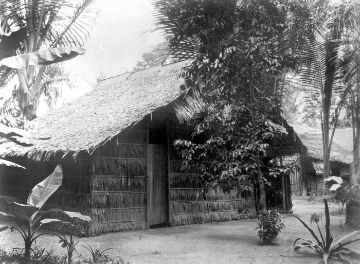 Repronegatief. Een huis met een dak en wanden van atap, Molukken